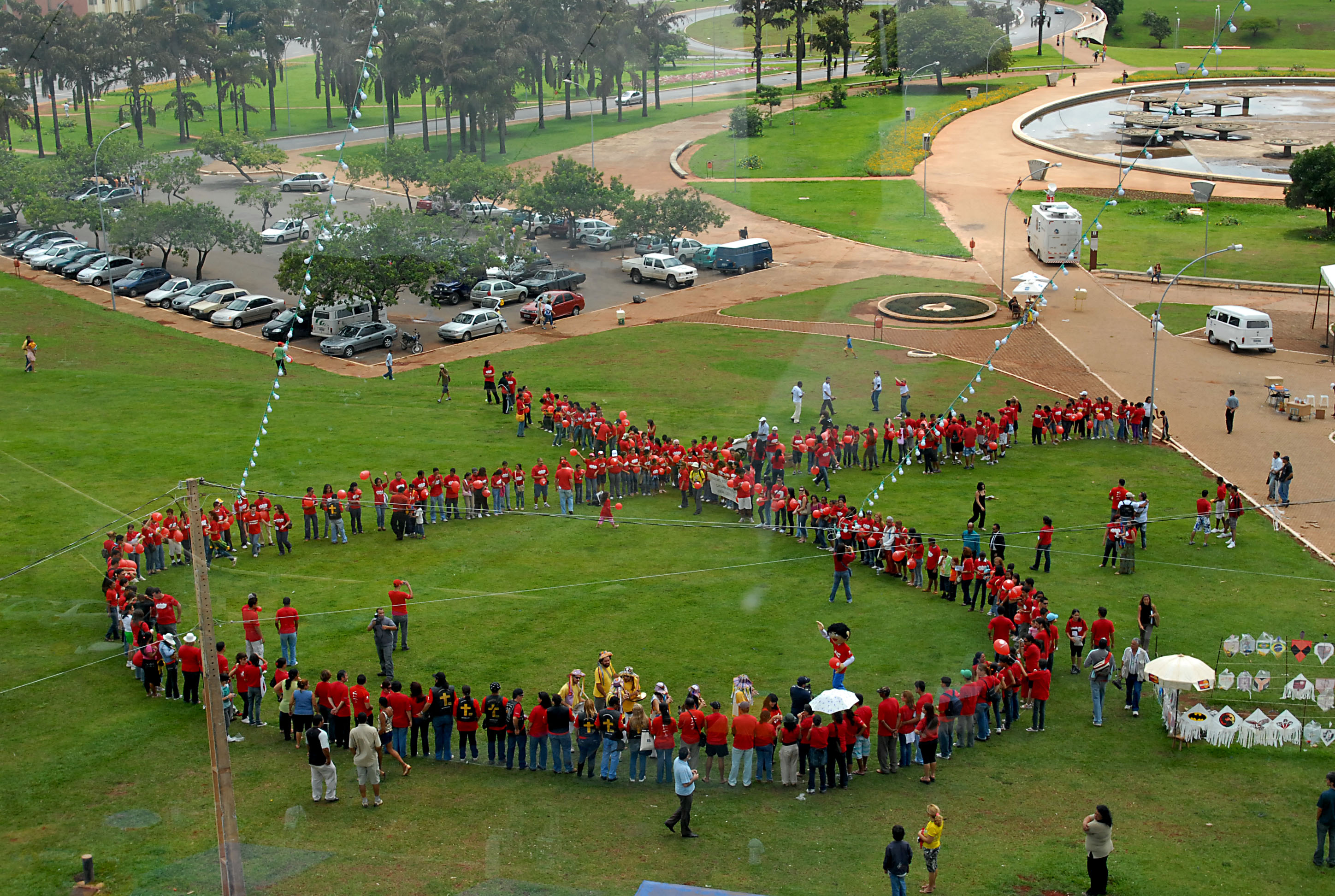 Imagem de uma manifestação do dia internacional contra a aids em Brasília.